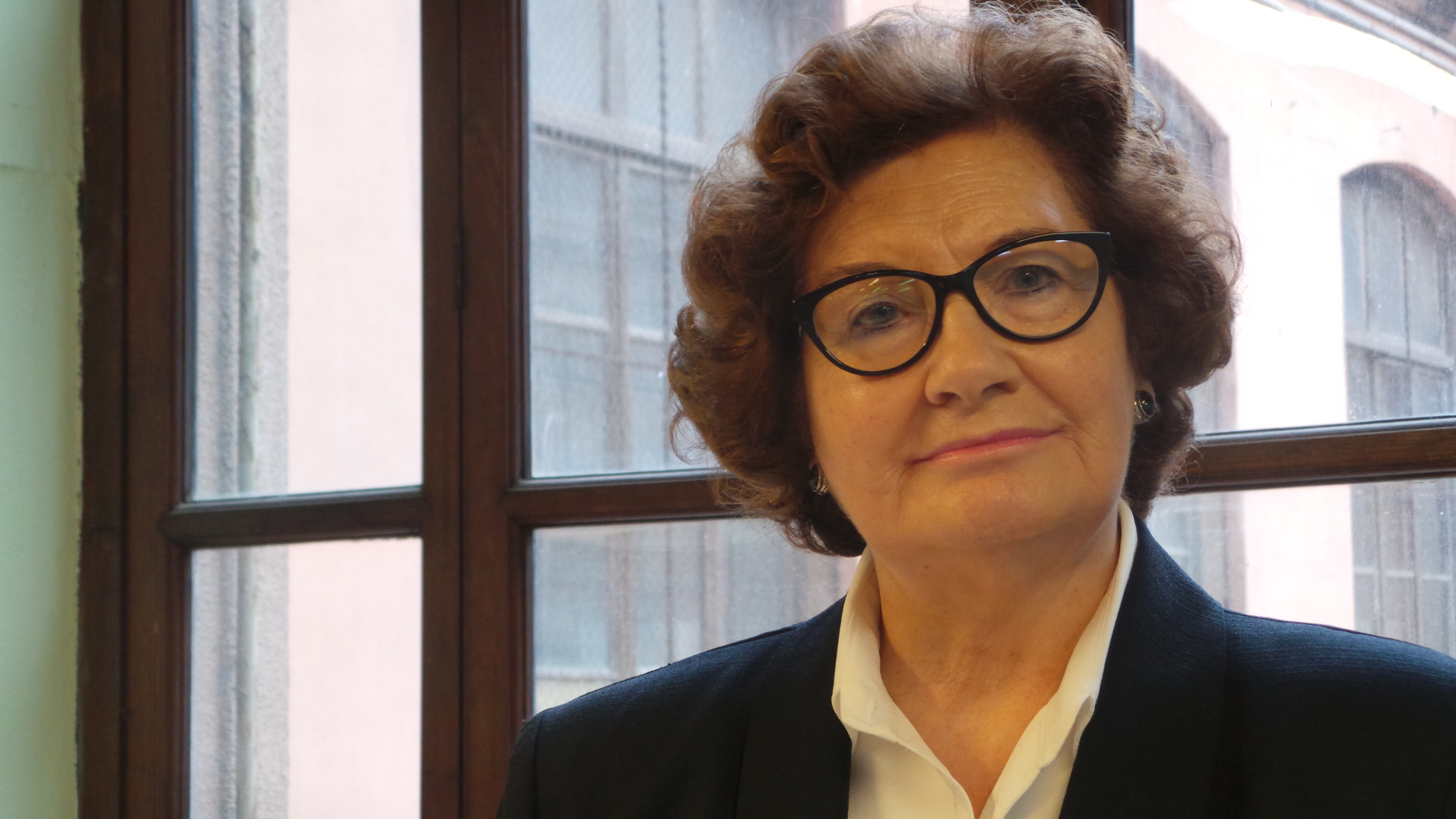 Antonina Rodrigo en la XVI Universidad de Verano de Estudios de género. Palma de Mallorca. Septiembre 2015